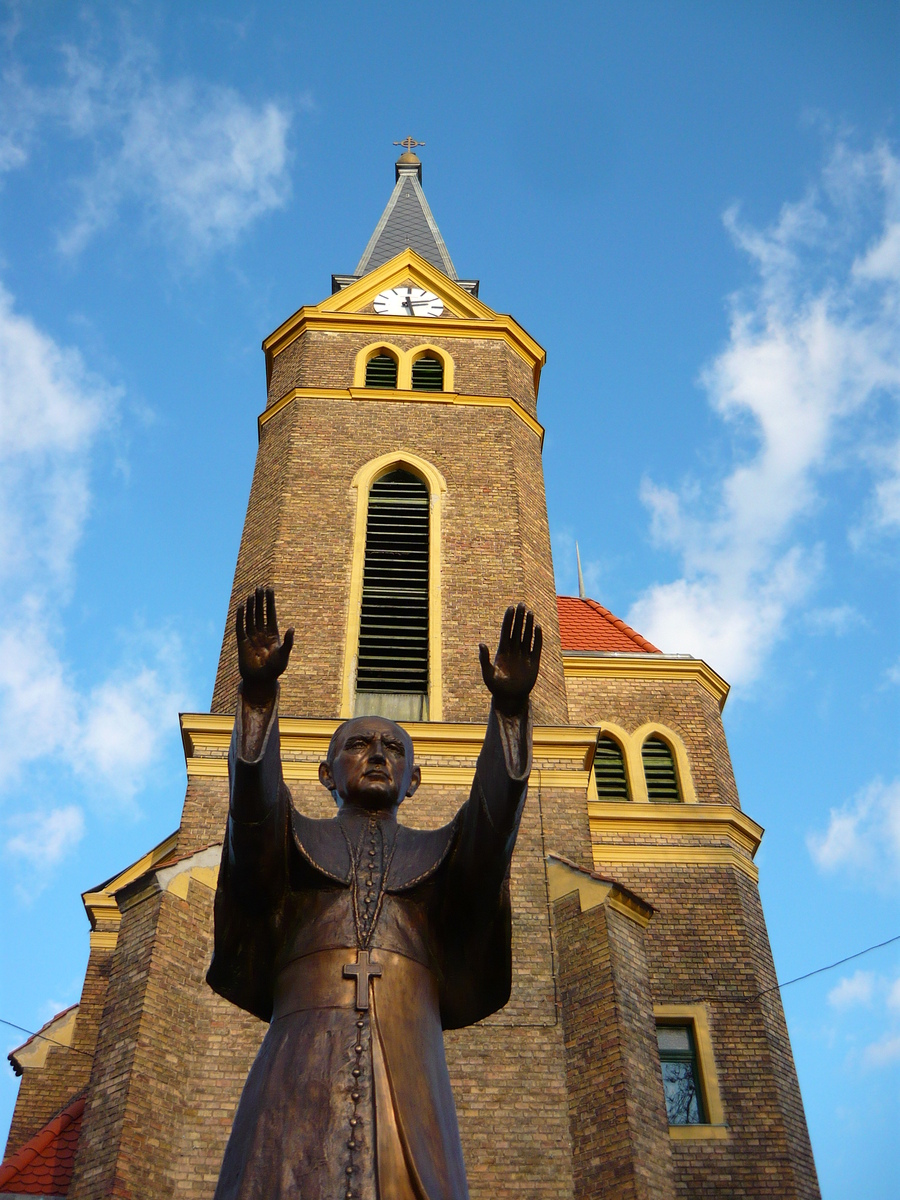 Szent Mihály-templom, Rákosszentmihály, Budapest